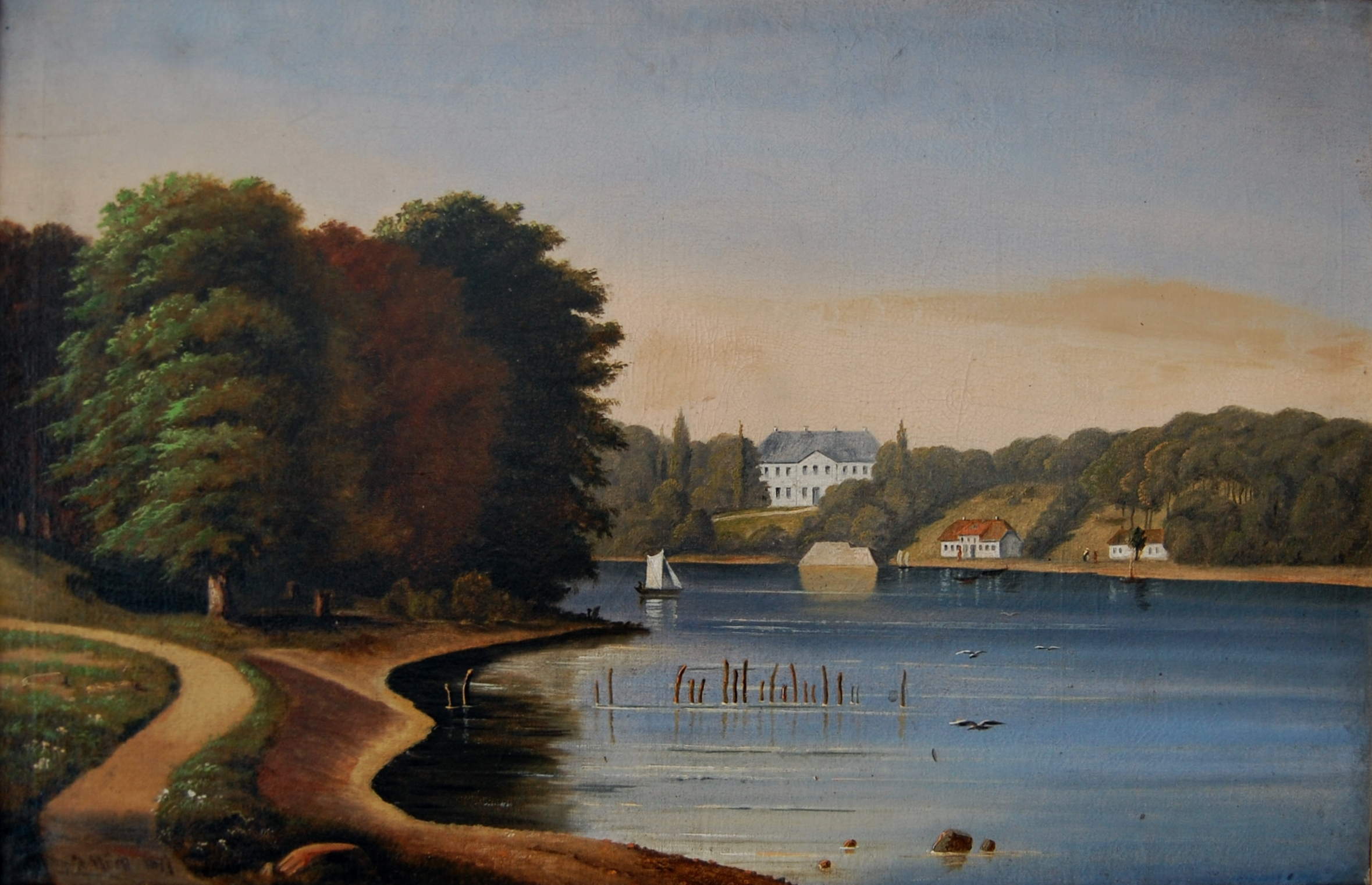 Schloss Hindsgavl bei Middelfart, von der Insel Fænø aus gesehen, 1877 gemalt vom deutsch-dänischen Maler Johannes Mück (1831-1919); das Gemälde befindet sich in meinem Eigentum. Dieses Bild war auf dem Rücktitel des Begleitheftes zur Sonderausstellung "MÜCK - en kunstmalerfamilie i Haderslev og Hamborg" (vom 1. September - 20. Oktober 2013) im Museum Sønderjylland in Haderslev abgebildet.